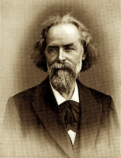 Élisée Reclus